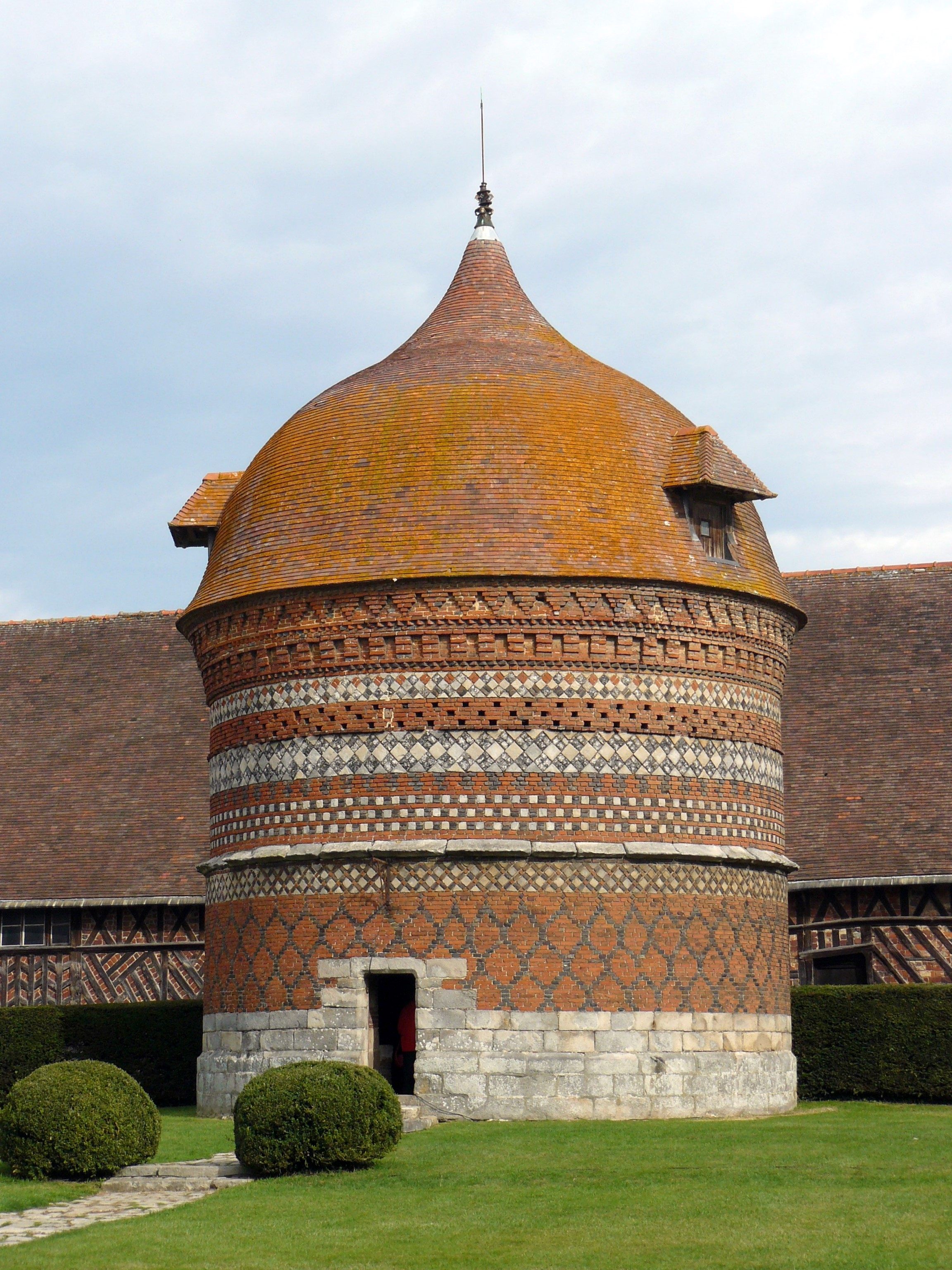 Manoir d'Ango (Varengeville-sur-Mer, Seine-Maritime, France) : le colombier